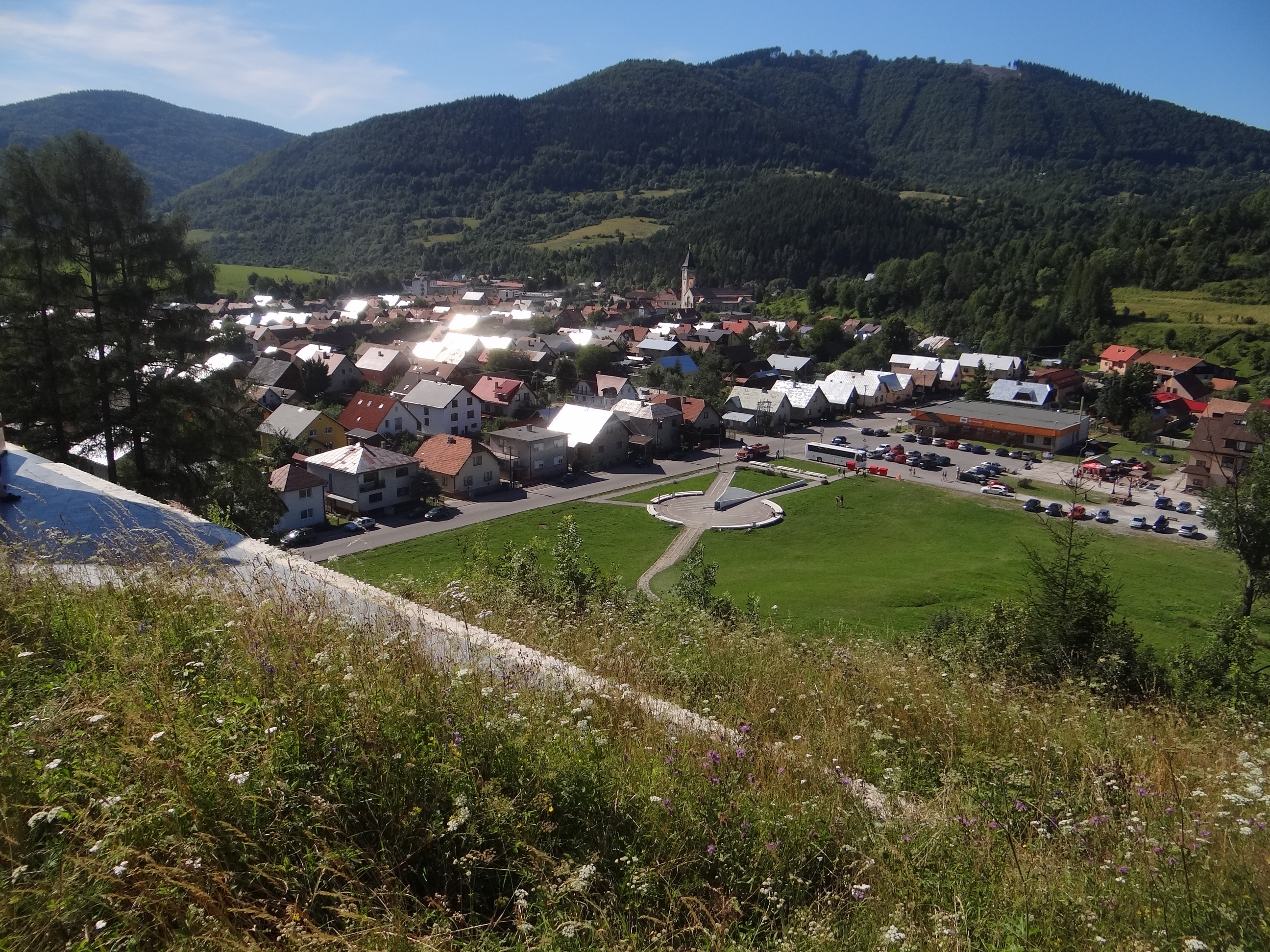 Terchová, Mravečník (Kysucká vrchovina)